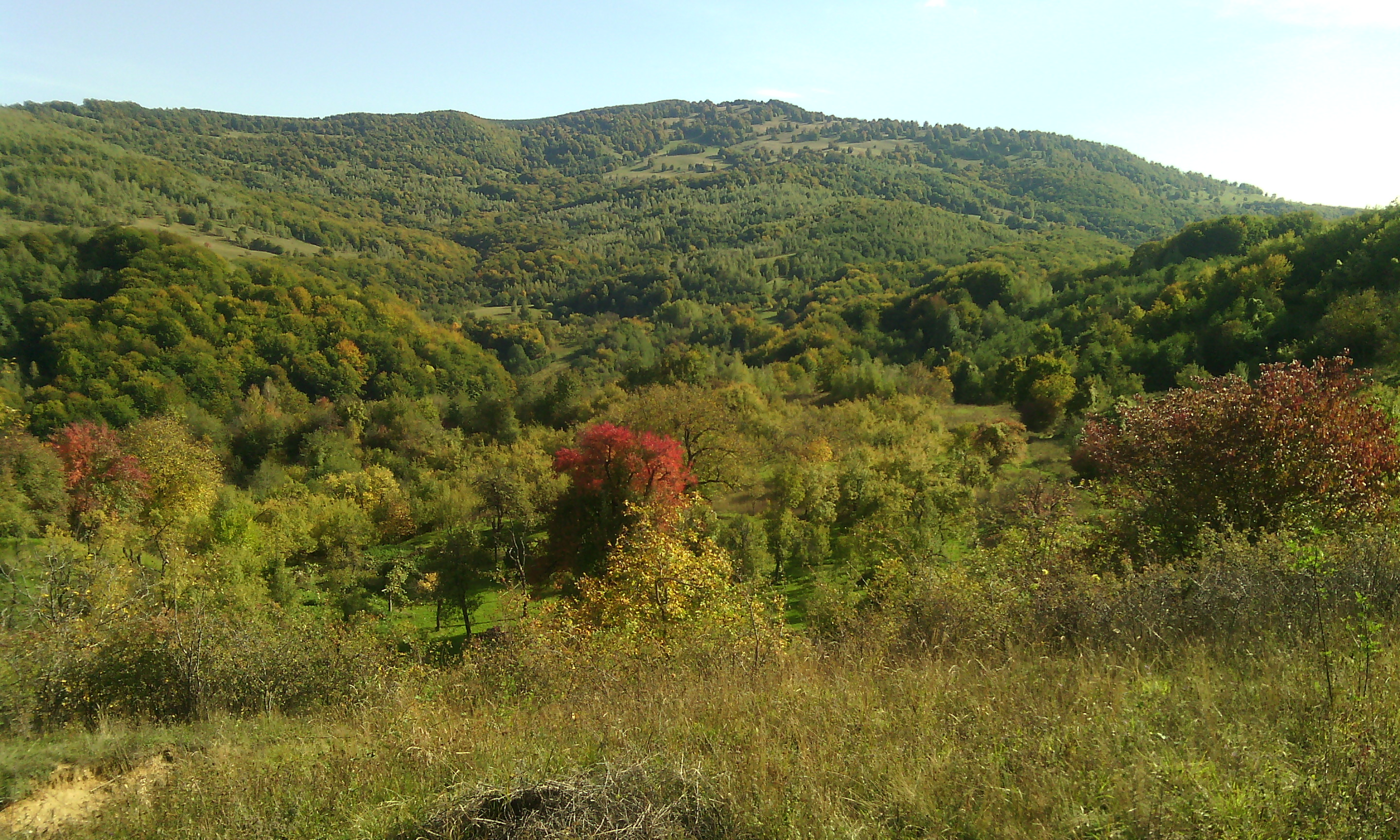 Măgura Priei, judeţul Sălaj